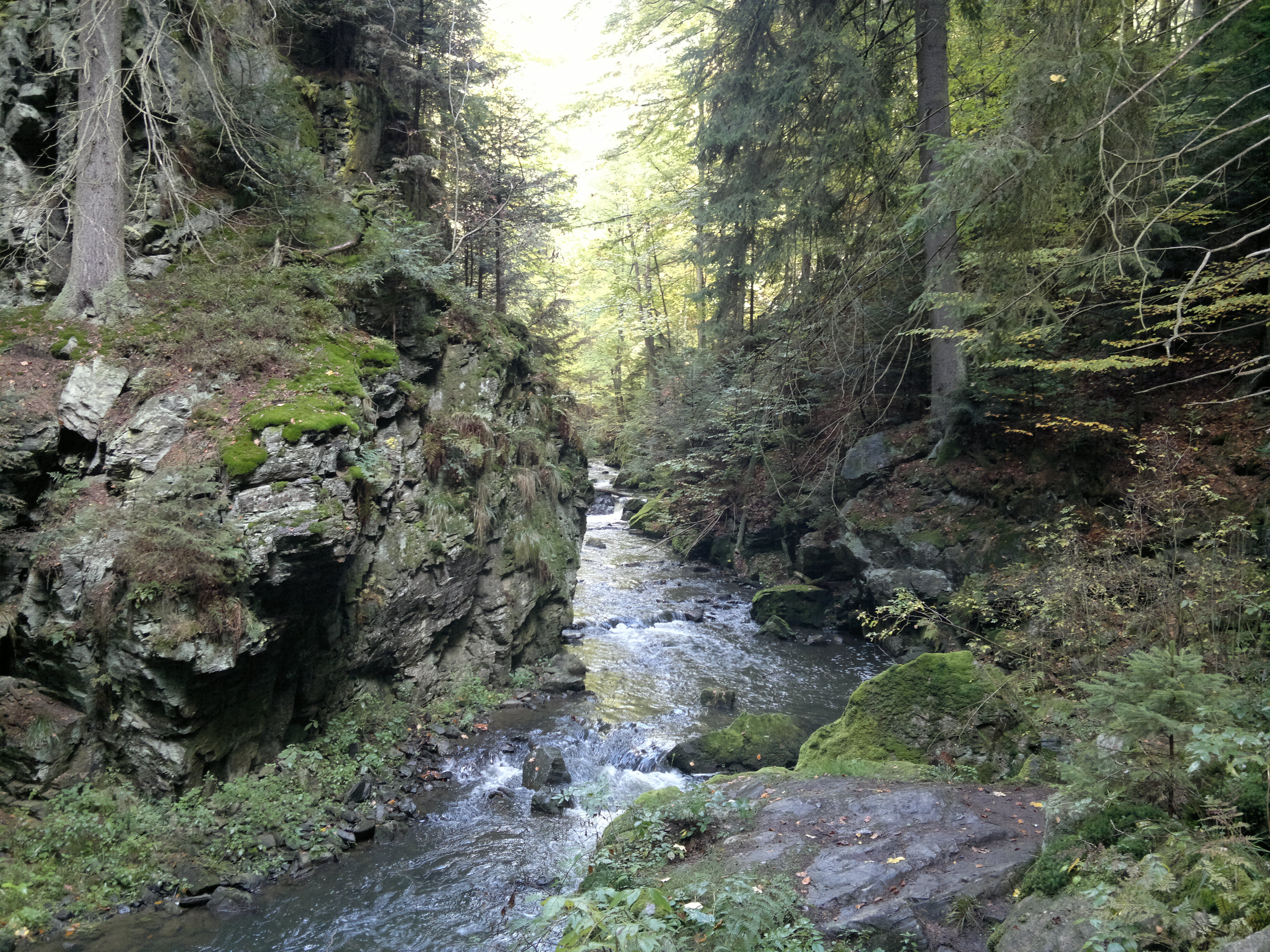 Řeka Doubrava pod Sokolohrady.